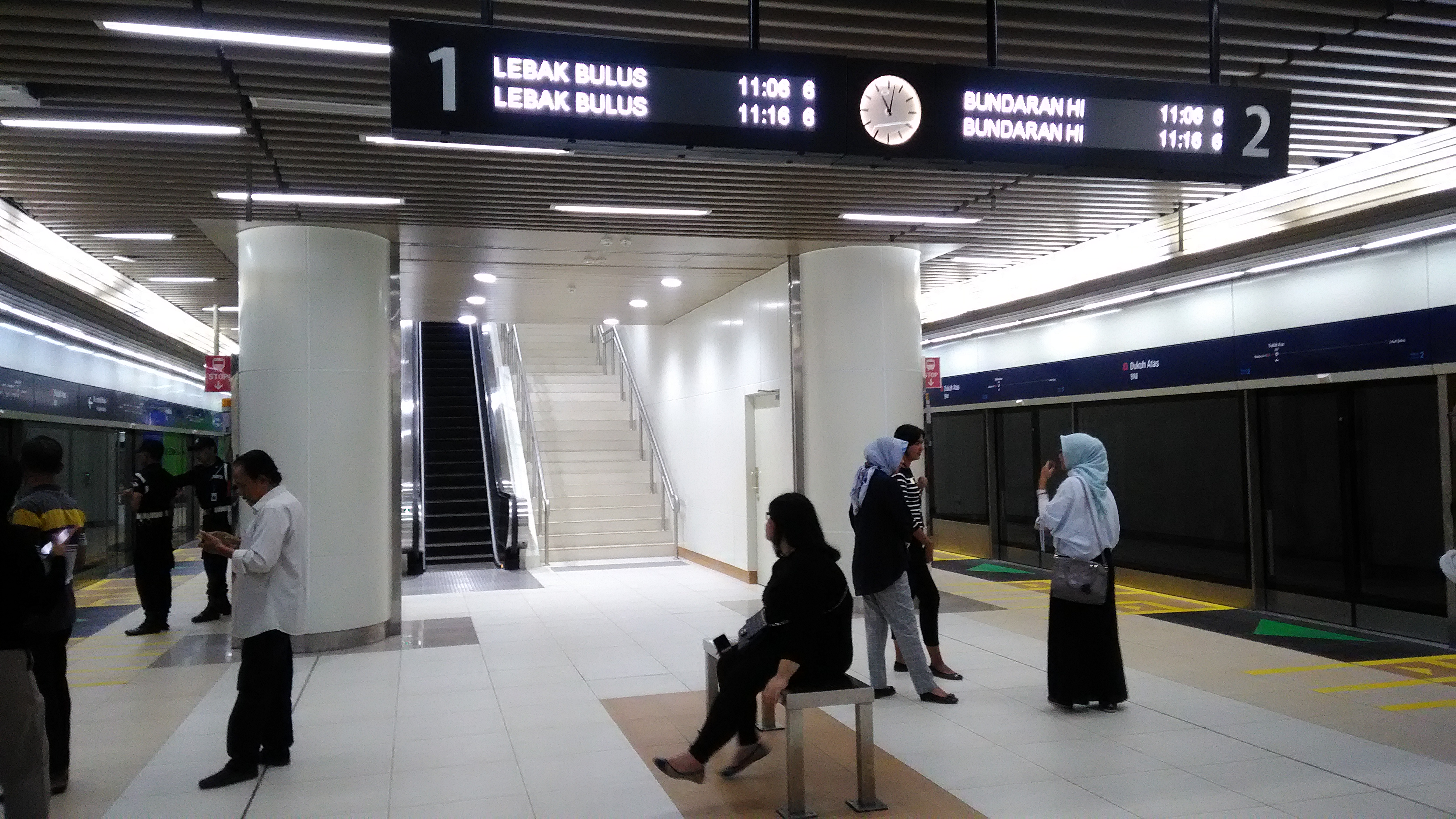 Peron Stasiun Dukuh Atas